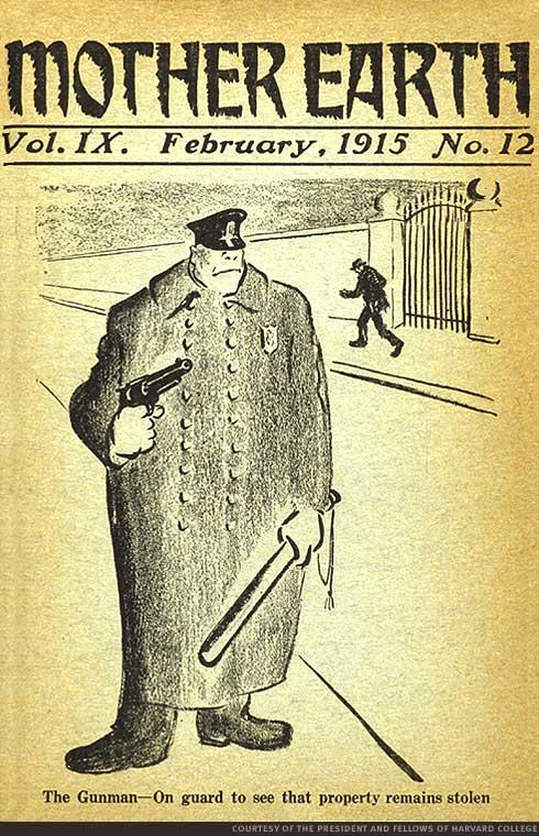 MotherEarth février 1915